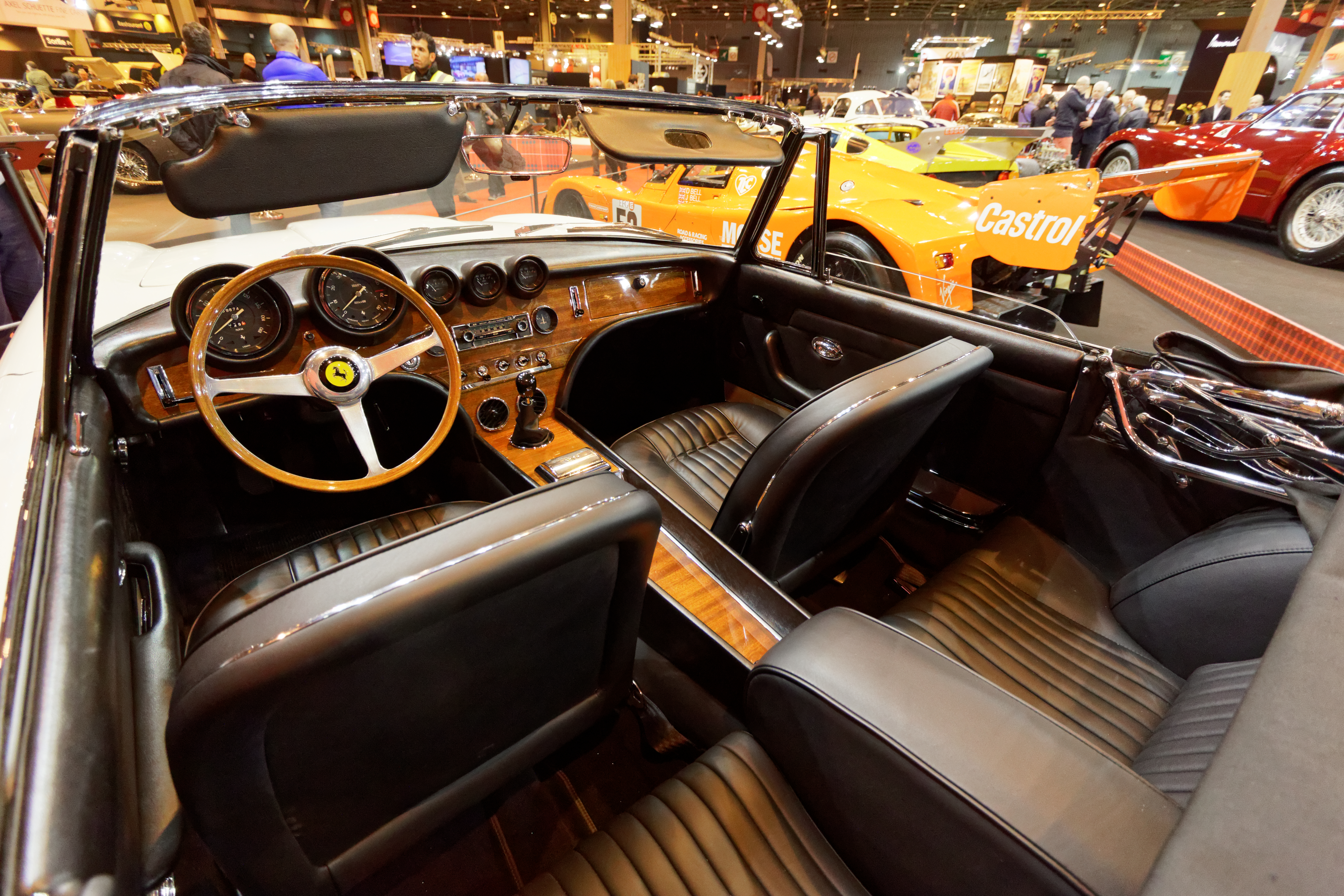 Une Ferrari 365 California de 1966 exposée lors du salon Rétromobile 2016.